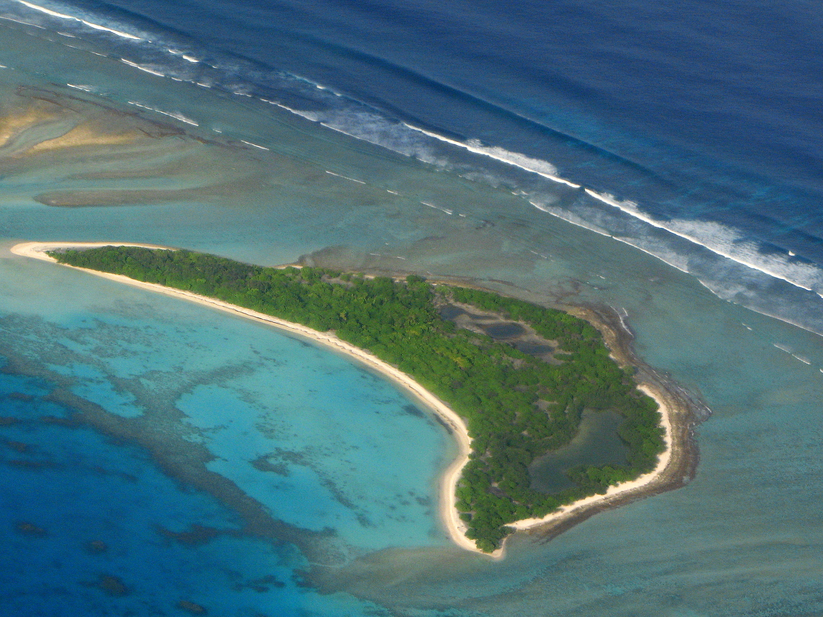 Addu Atoll